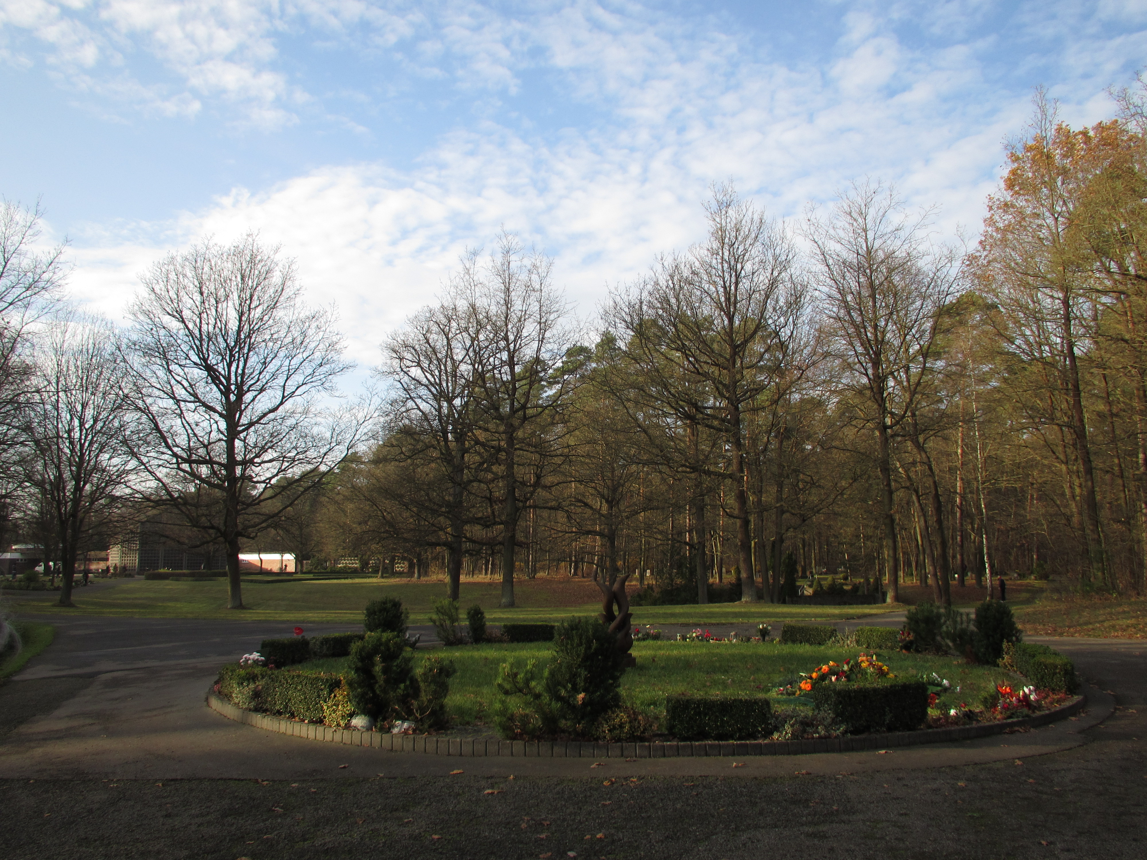 Im Jahr 1974 wurde auf Beschluss des damaligen Rat des Kreises der Städtische Waldfriedhof am Eggersdorfer Weg in Strausberg Vorstadt auf dem Gelände neben der alten Rennbahn, an der Grenze zu Eggersdorf errichtet. Seit 1978 finden dort Beerdigungen statt.